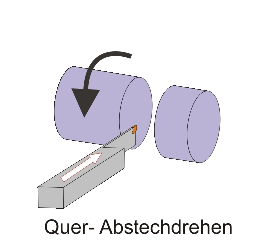 Querabstechdrehen